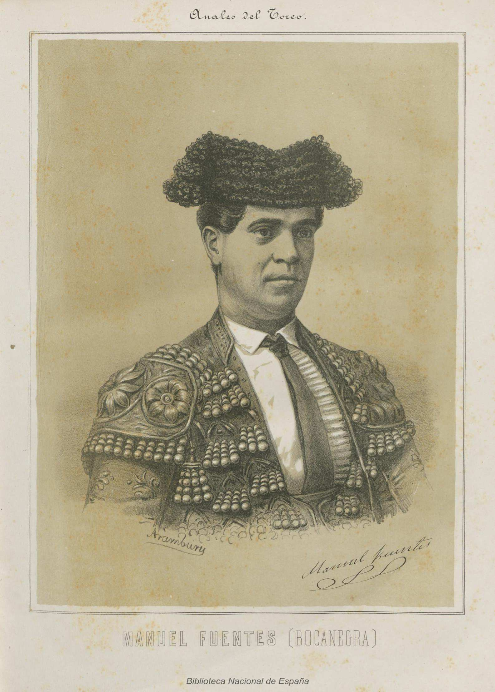 Retrato de Manuel Fuentes (Bocanegra), grabado de Aramburu para "Anales del toreo : reseña histórica de la lidia de reses bravas : galería biográfica de los principales lidiadores : razón de las primeras ganaderías españolas, sus condiciones y divisas obra escrita por José Velázquez y Sánchez ; e ilustrada por reputados artistas", Madrid, 1888. Biblioteca Nacional de España